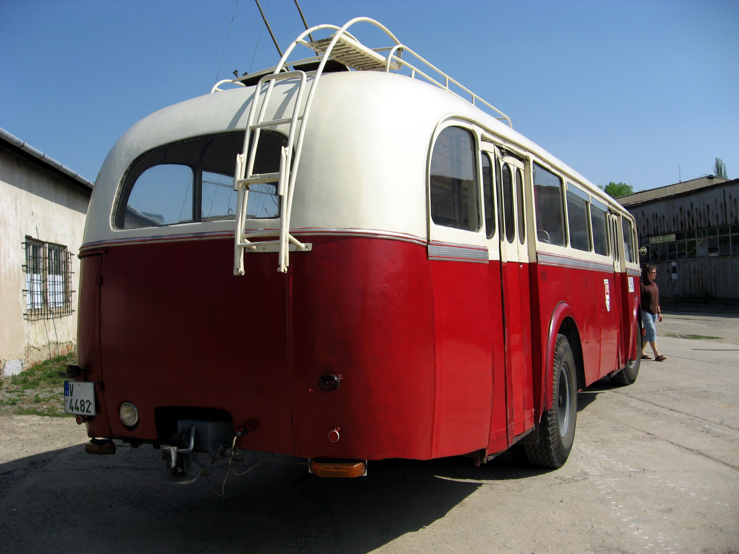 Autobus Škoda 706 RO v Řečkovicích